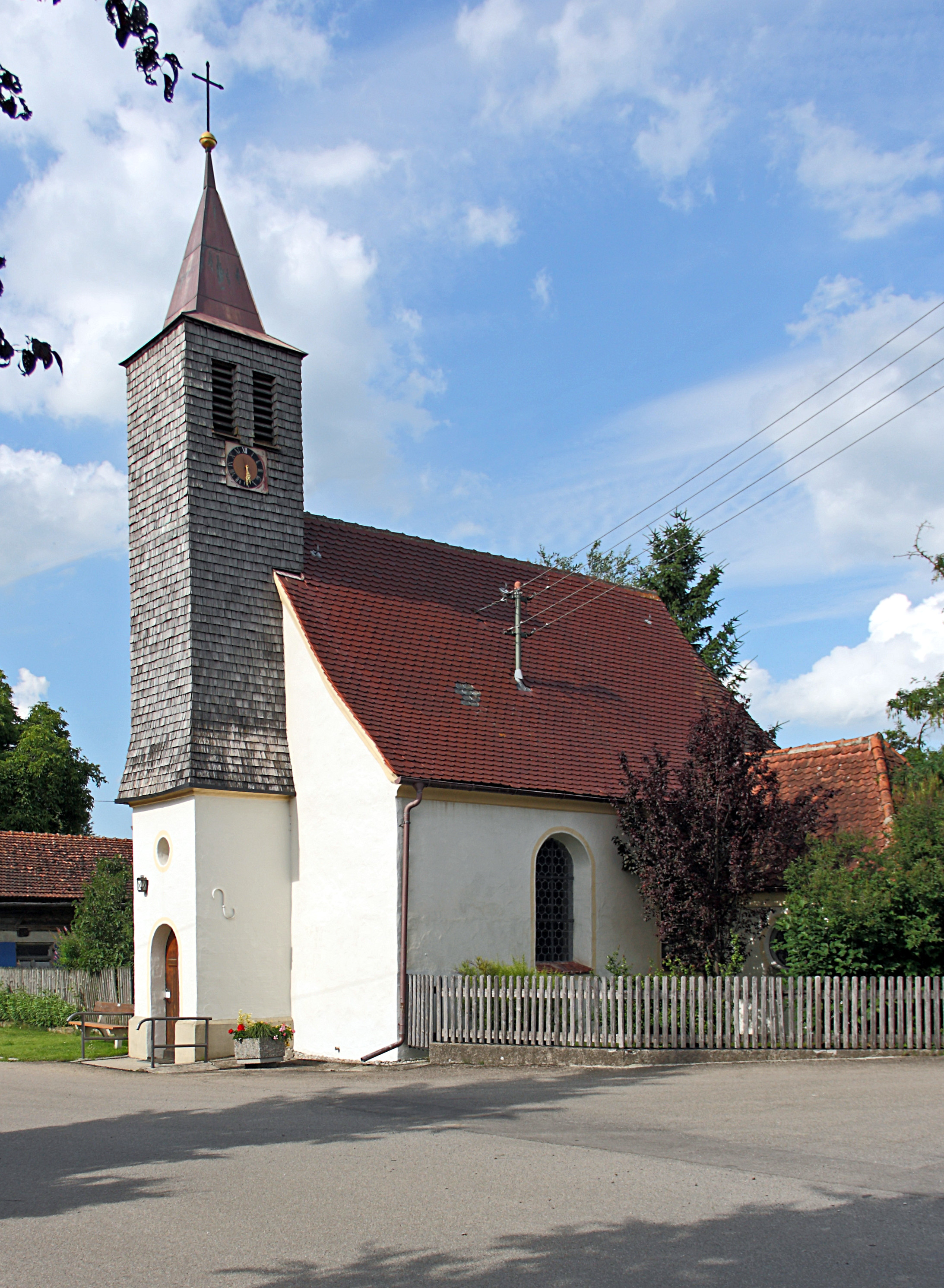 Ansicht aus Südwest